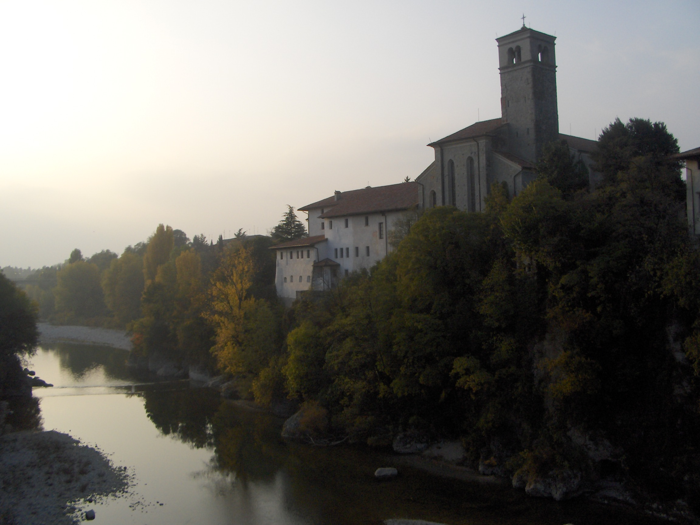 Sebi1, Cividale vista dal Ponte del Diavolo